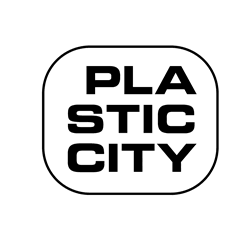 Offizielles Logo des Labels